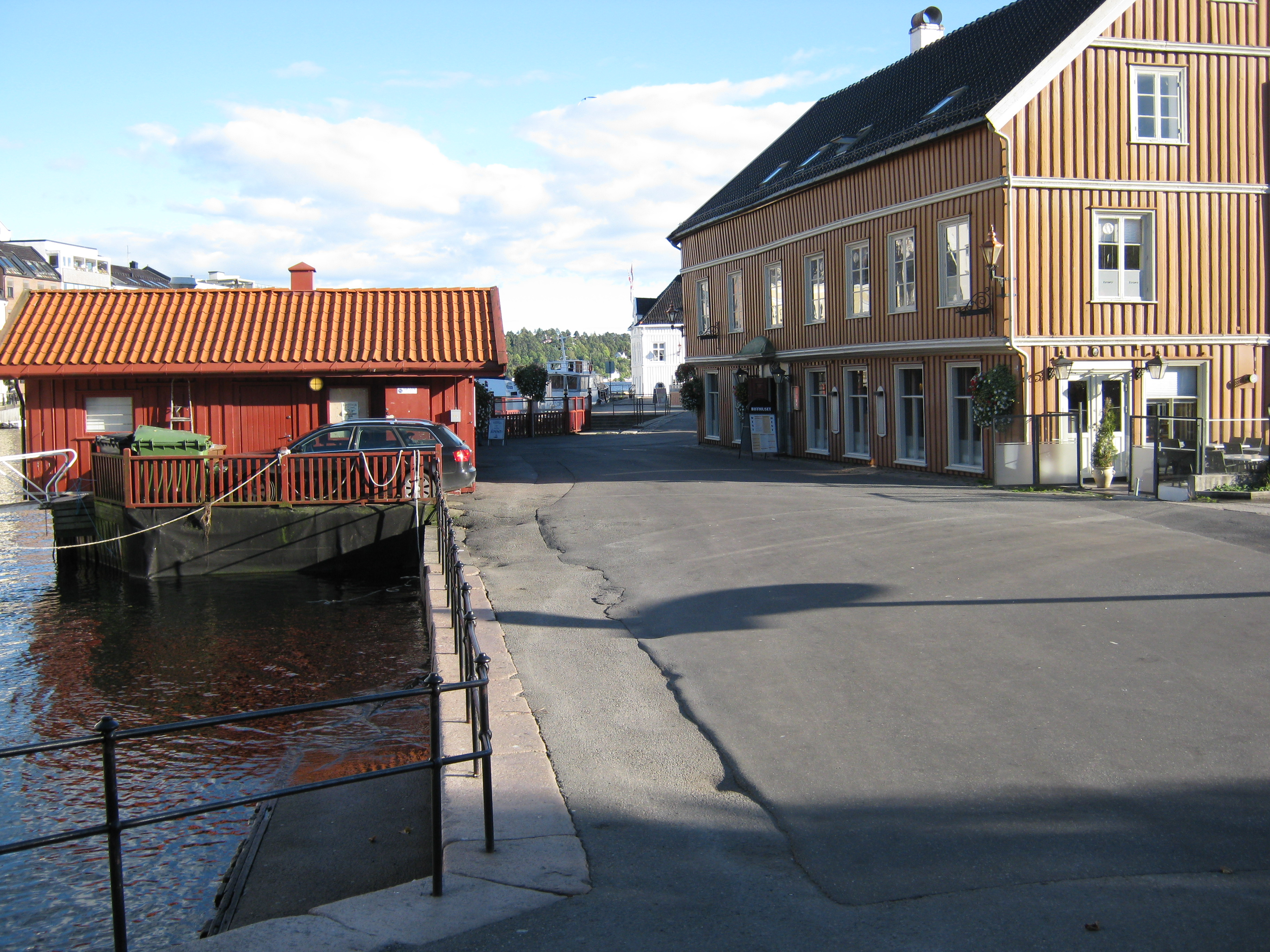 Nedre Tyholmsvei i Arendal